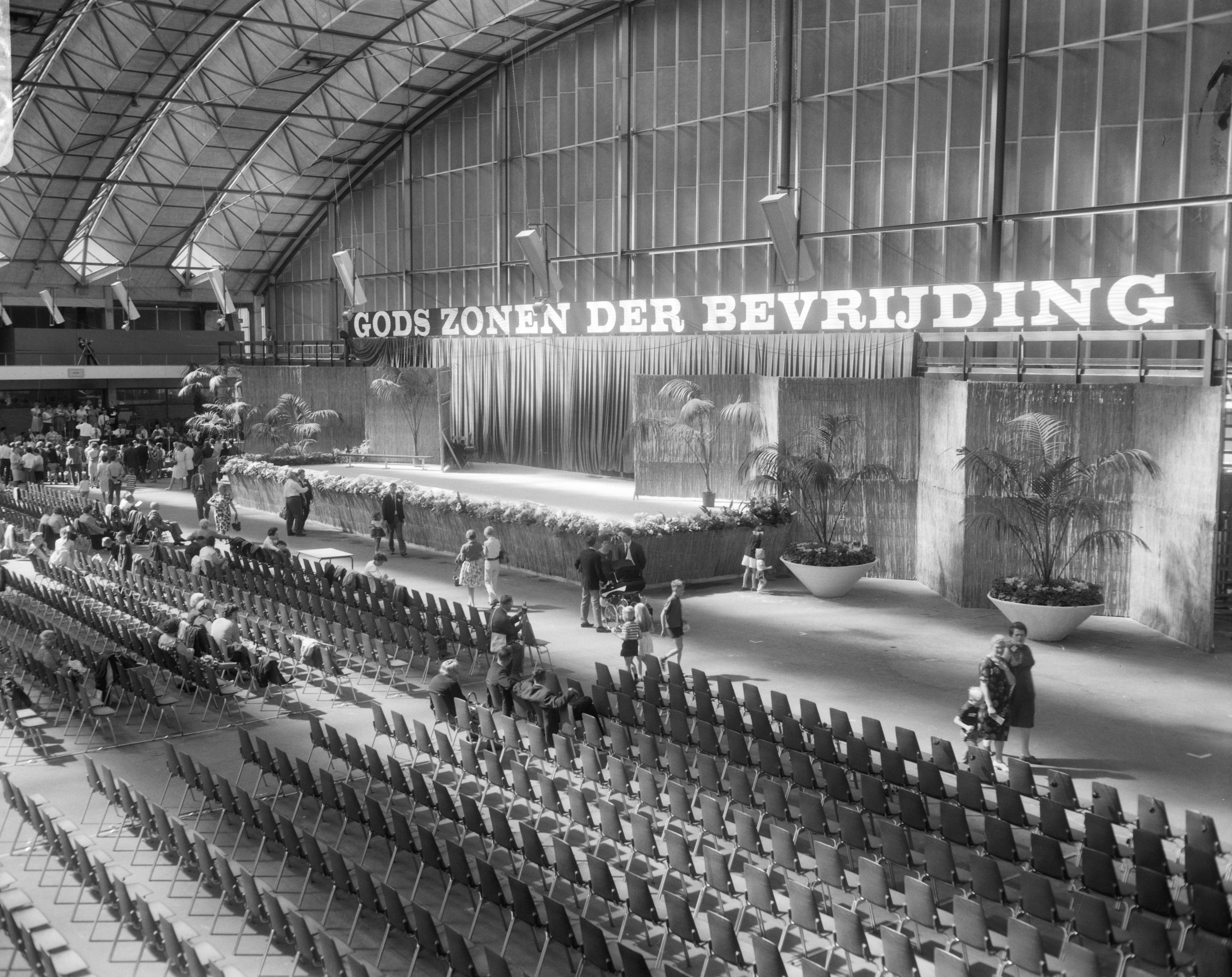 Collectie / Archief : Fotocollectie Anefo Reportage / Serie : [ onbekend ] Beschrijving : Congres Jehova-getuigen, overzicht Congreszaal Datum : 17 augustus 1966 Trefwoorden : congressen, overzichten Fotograaf : Bilsen, Joop van / Anefo Auteursrechthebbende : Nationaal Archief Materiaalsoort : Negatief (zwart/wit) Nummer archiefinventaris : bekijk toegang 2.24.01.04 Bestanddeelnummer : 919-4569